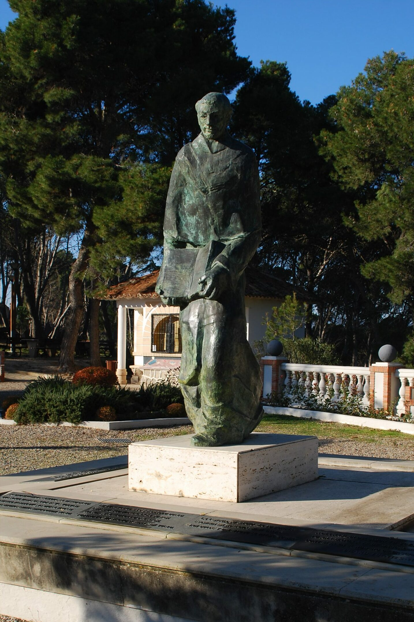 Fray Pedro Malón de Echaide, escultura en Cascante.